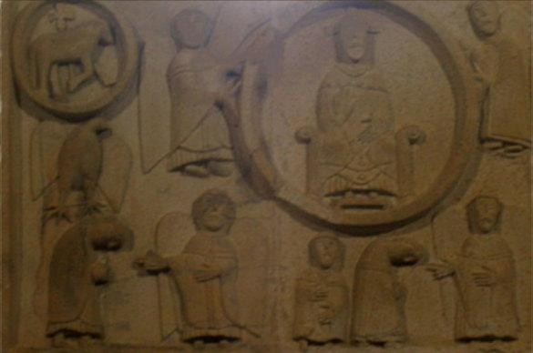 San Martiño de Mondoñedo (retablo)